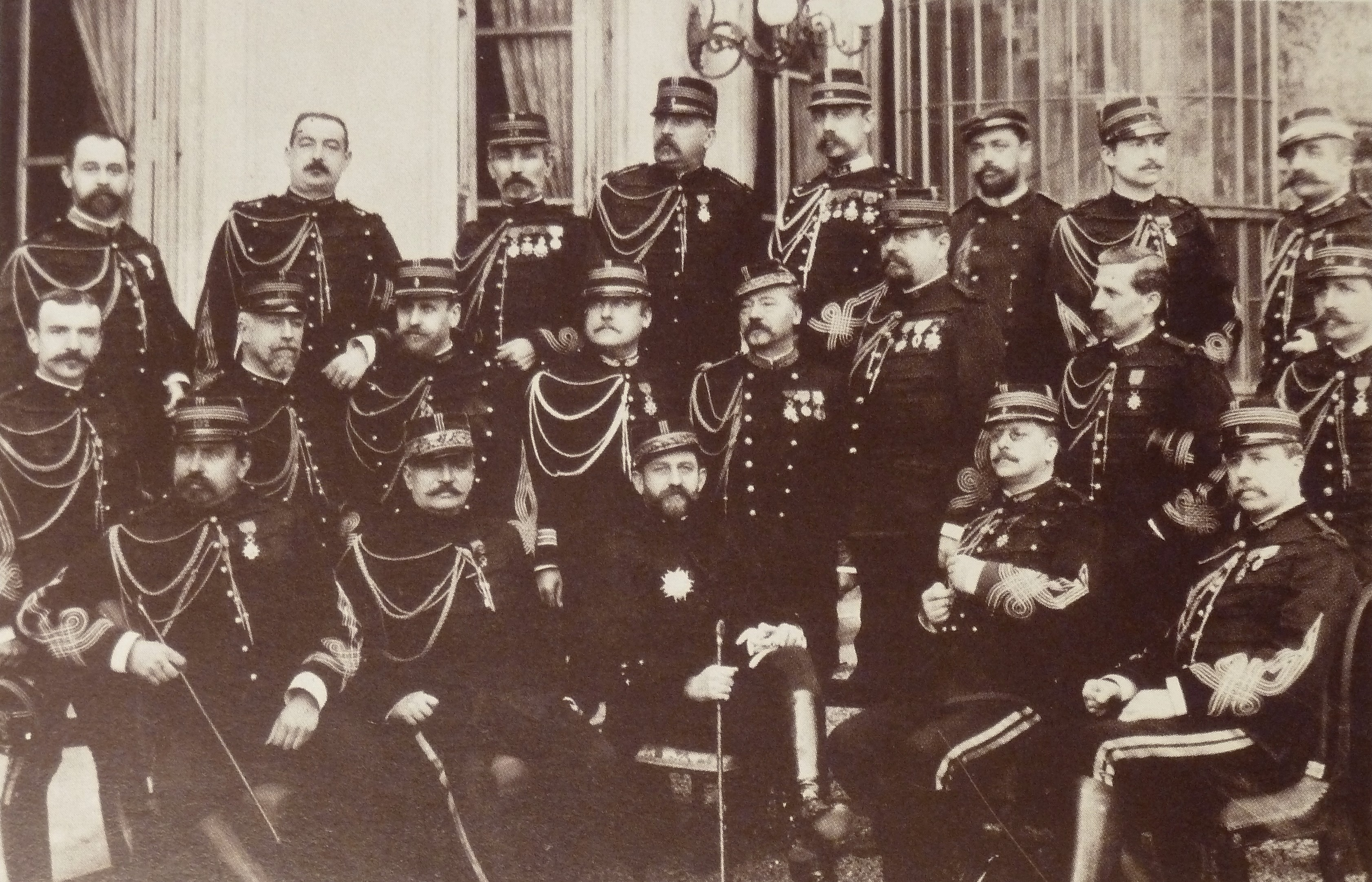 L'état-major du général Georges Boulanger (au centre). Photo de 1886, photographe inconnu. Archives Larousse, ancienne collection Georges Sirot.